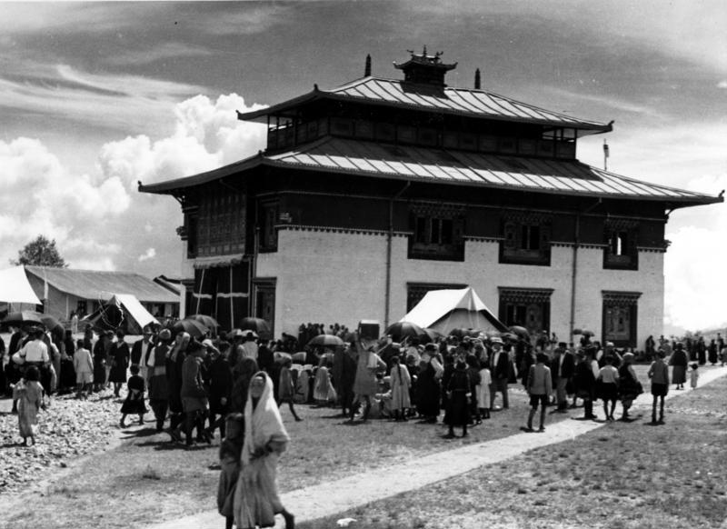 Gangtok, Tempel des Maharadschas